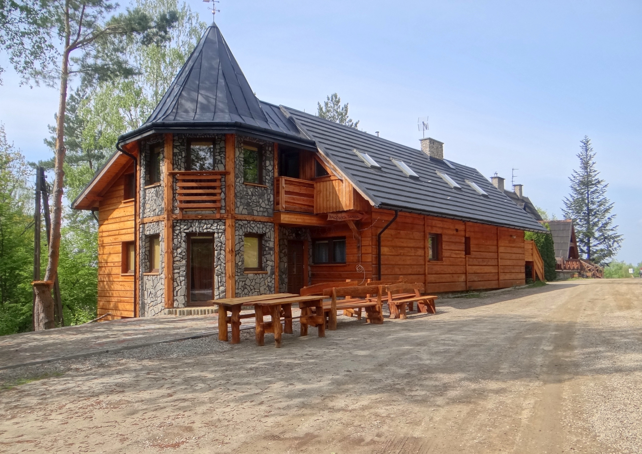 Bacówka w Jamnej